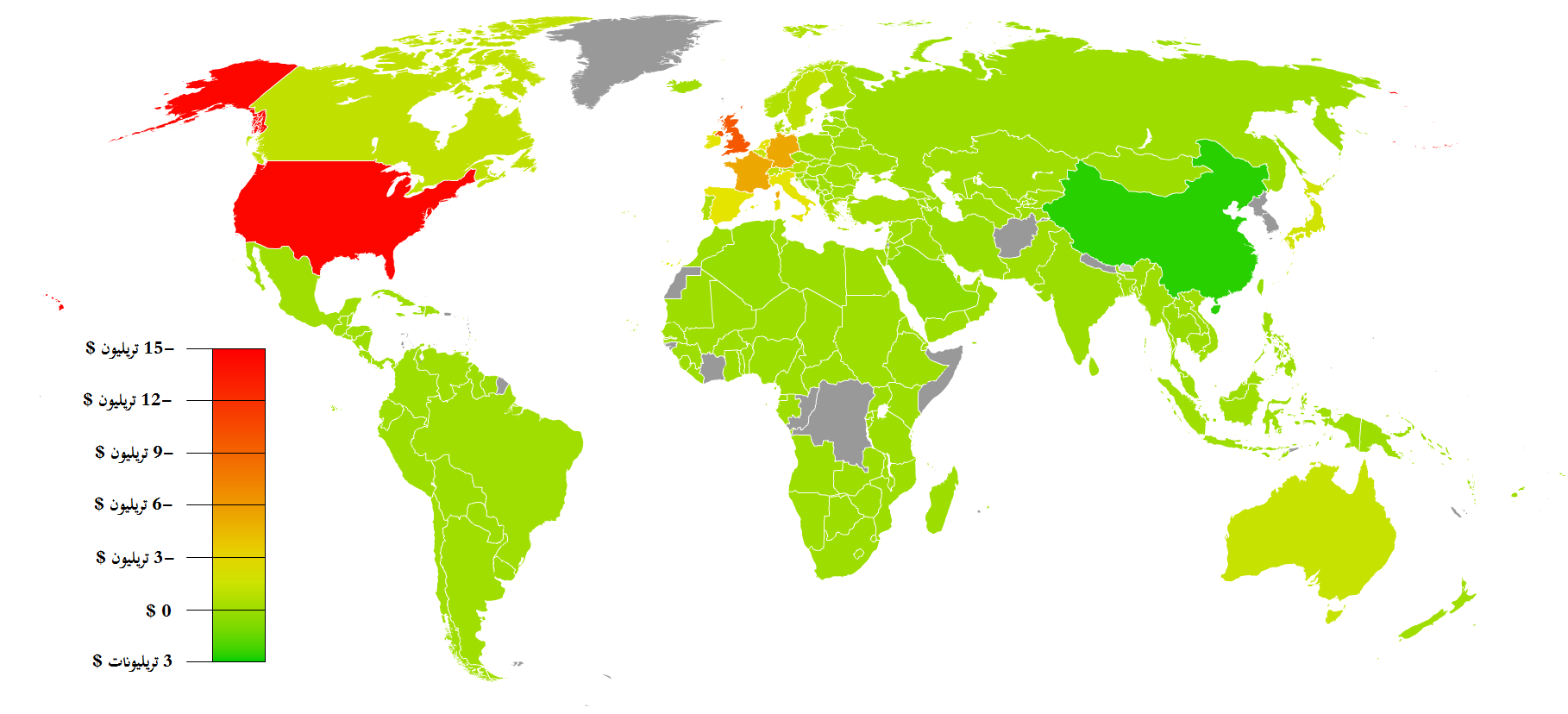 (إحتياطي العملات الأجنبية والذهب) ناقص (إجمالي الدين الخارجي للقطاعين العام والخاص). المصدر: CIA factbook،وُصل إليه بتاريخ 3 يونيو 2011. This map was created with GunnMapGunnMap was created by Arthur Gunn and is available, free, at and attribute by linking to